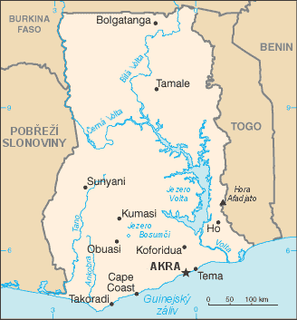 česká předělávka z